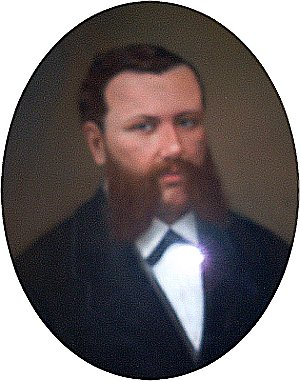 copia ridotta di File:Bisnonno Ernest Stamm.JPG